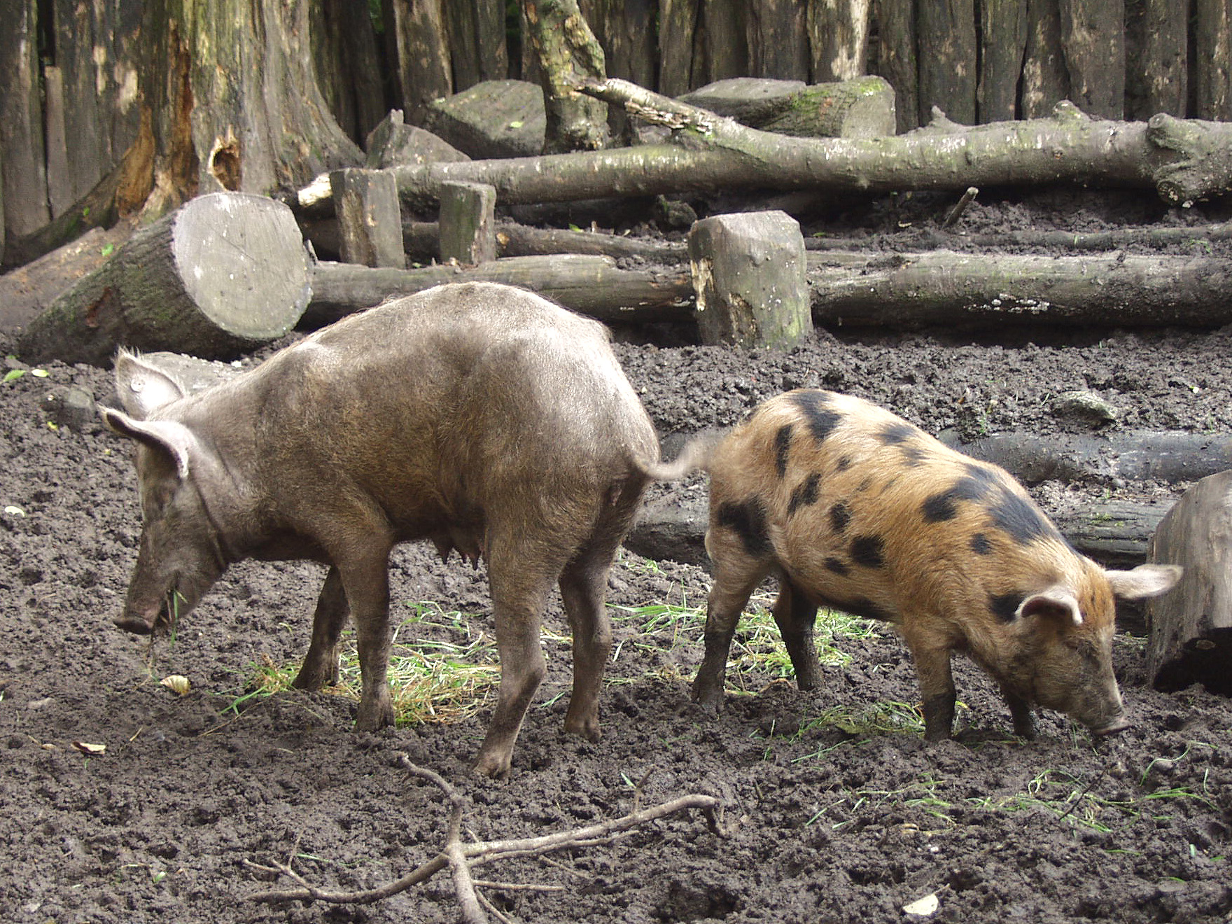 Rückzüchtung des sogenannten Düppeler Weideschweines im AFM Oerlinghausen